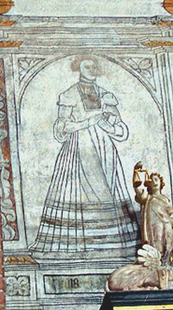 Berengarie Portugalská